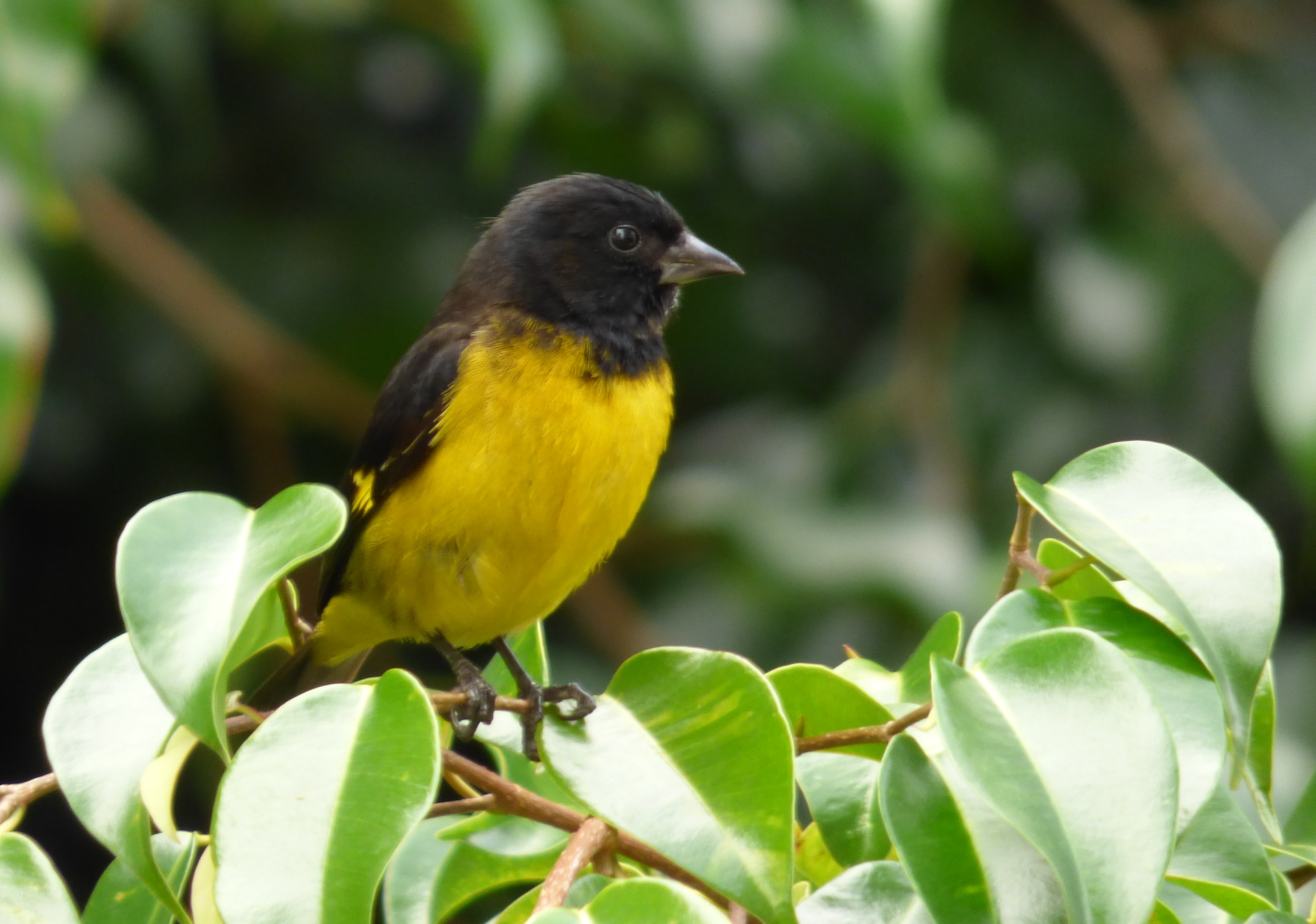 Sporagra xanthogastra (Jilguero pechinegro)